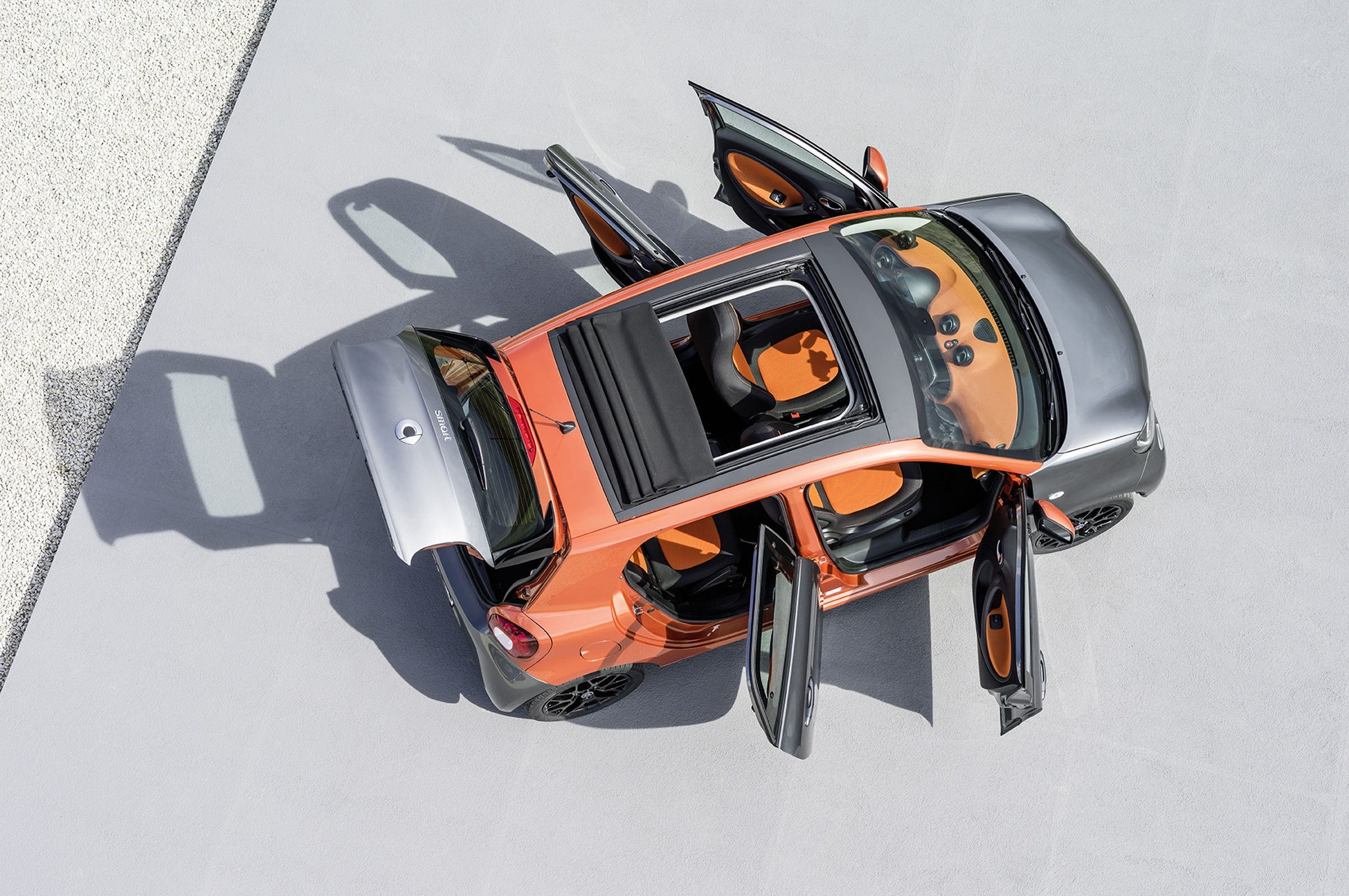 Pressefotos von Smart